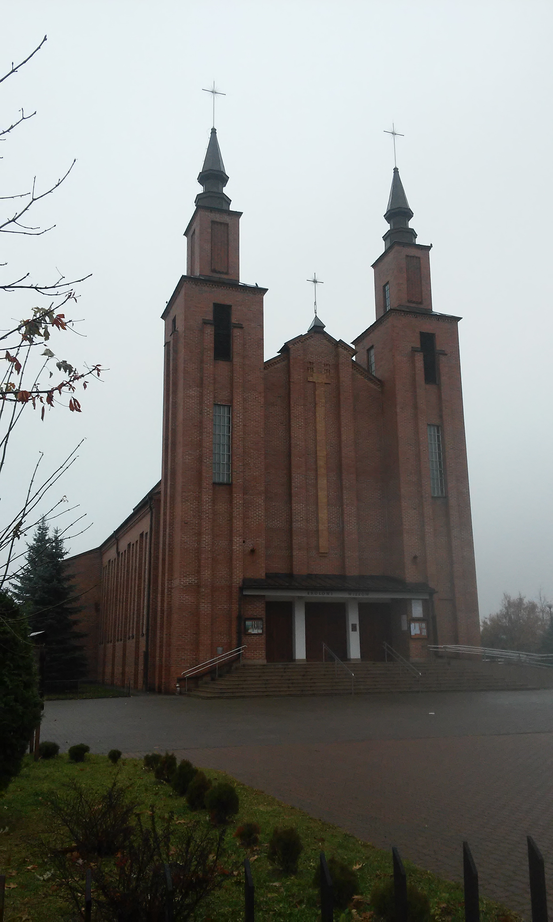 Kościół Chrystusa Króla w Międzyrzecu Podlaskim